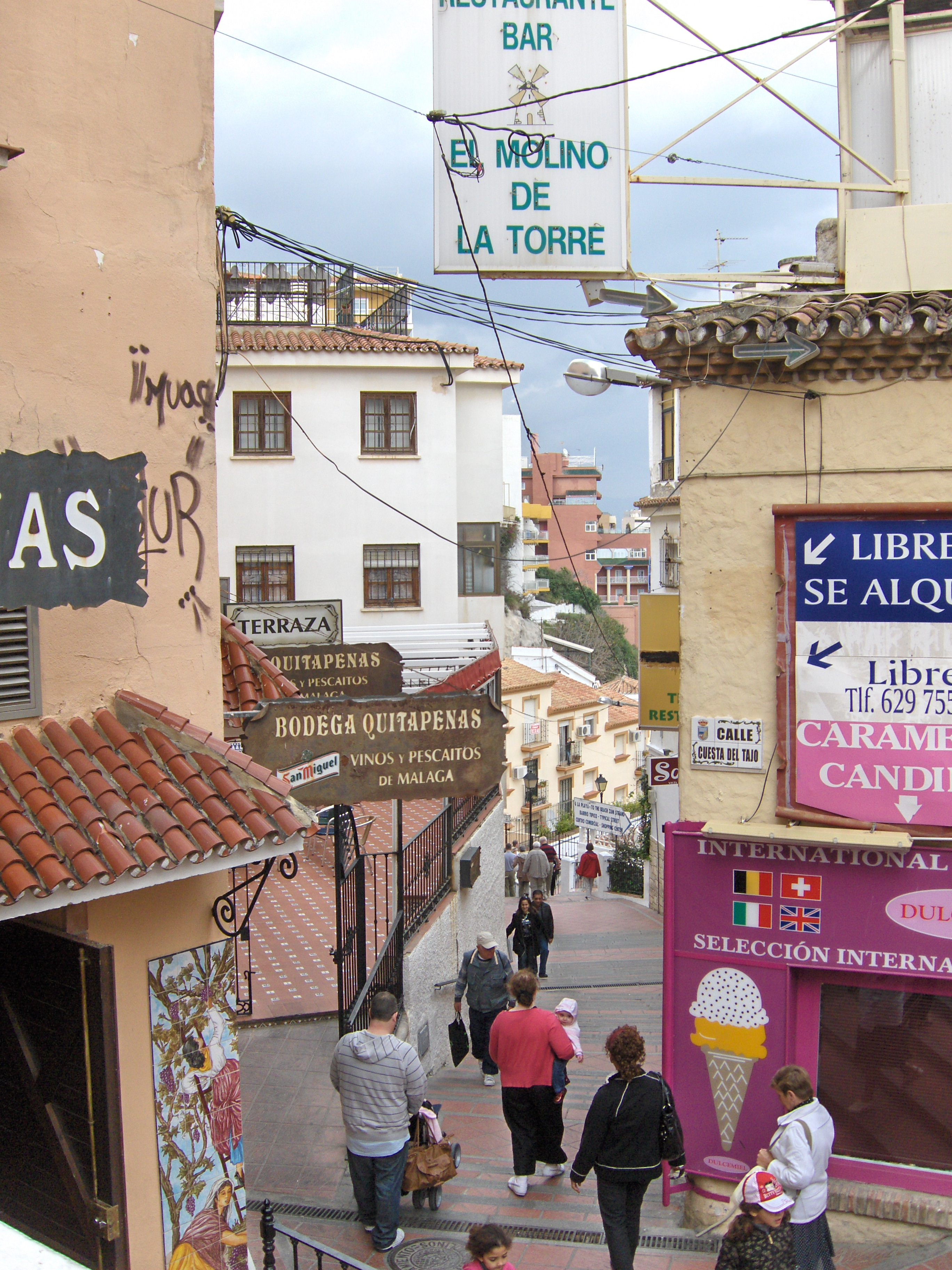 Bajada a El Bajondillo, Torremolinos, Málaga.